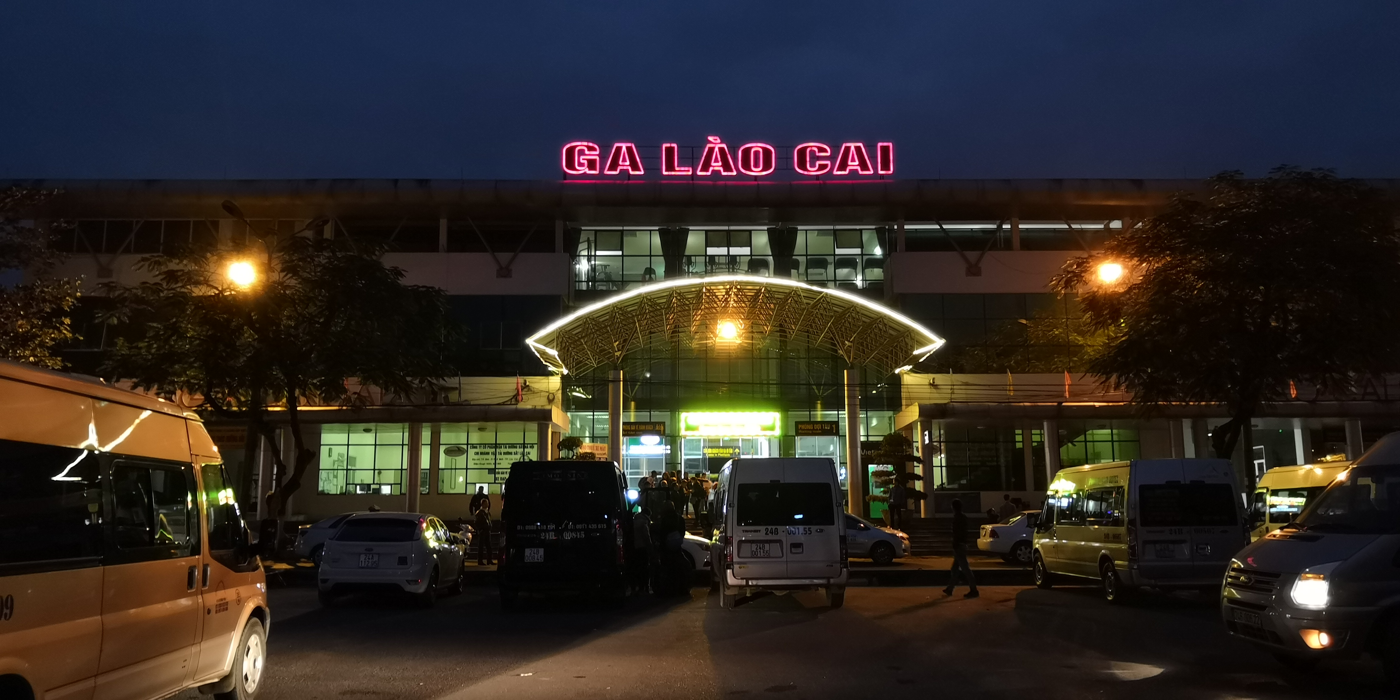 老街站（2019年01月04日）